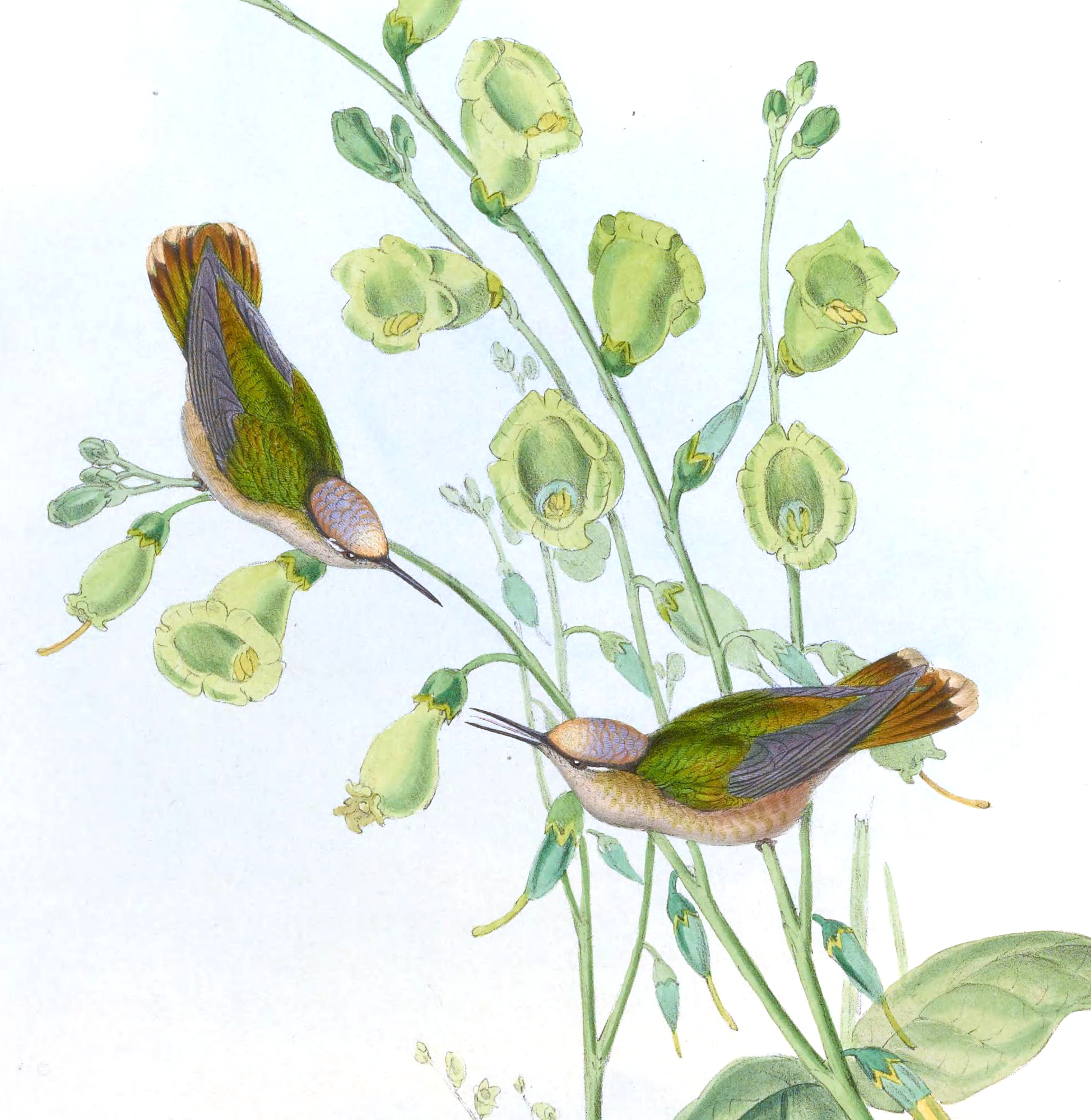 Anthocephala floriceps = Syn: Adelomyia floriceps in John Gould's Hummingbirds ISBN 978-1555216610